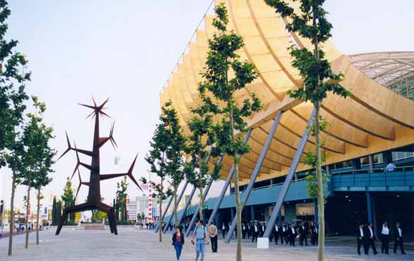 Aspecto de la Expo Lisboa 1996